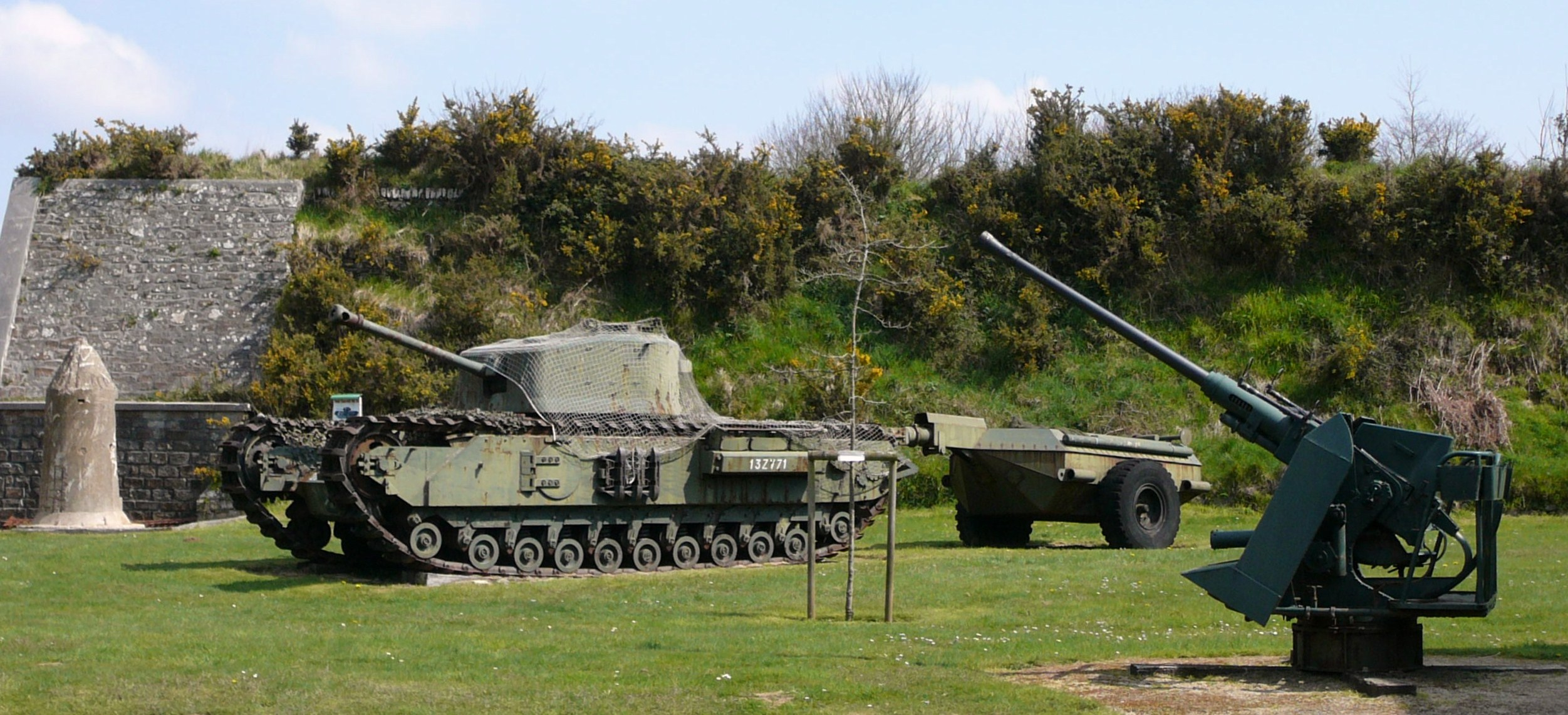 A Churchill tank in the Fort Montbarey Brest